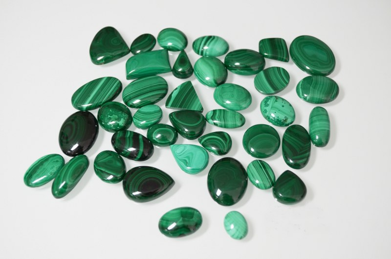 Μαλαχίτες Καμποσόν